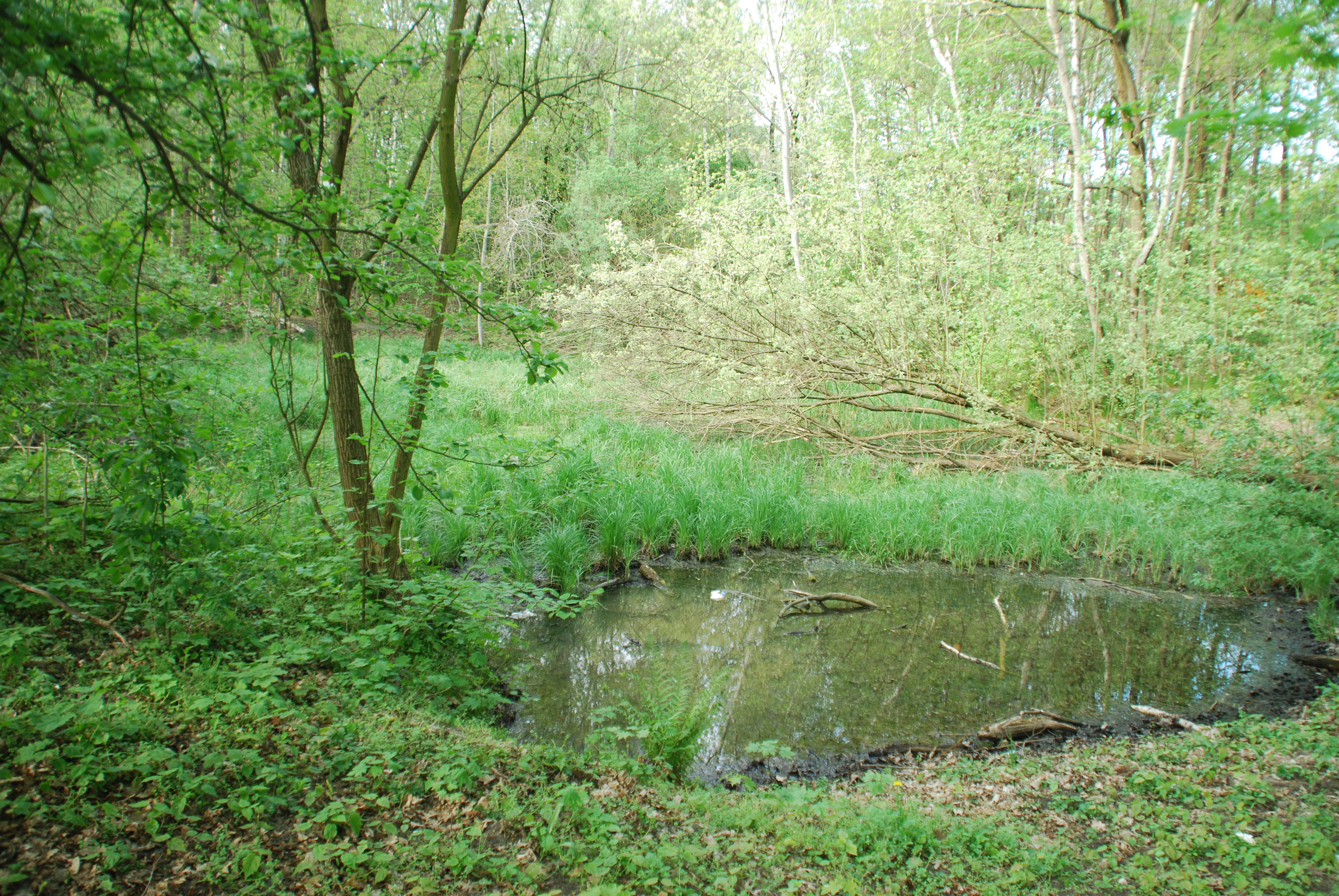 Der Paddenpfuhl in Woltersdorf (bei Berlin) im April 2012.